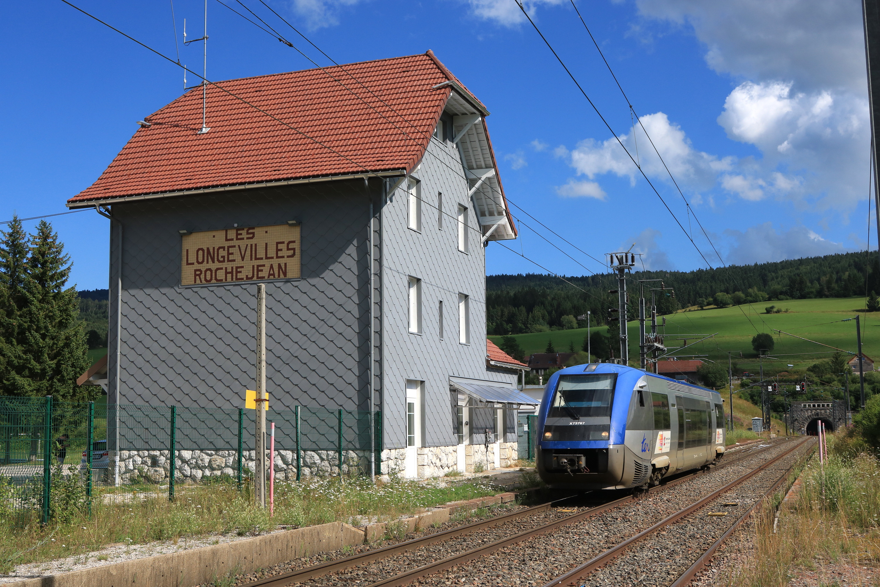 Le TER n°18126 (Vallorbe - Pontarlier) assuré par l'X 73767 passe sans arrêt la gare des Longevilles - Rochejean.